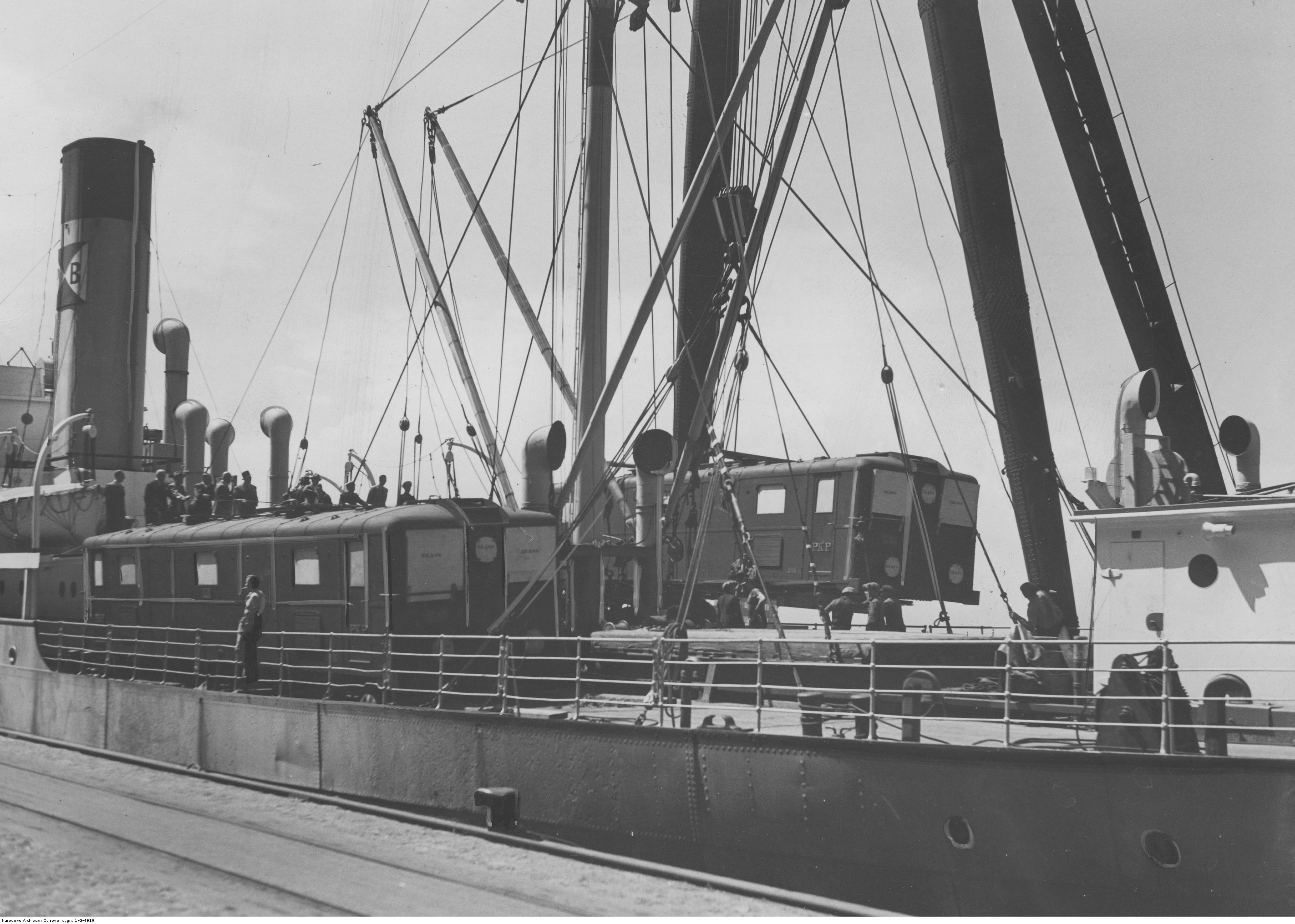 Wyładunek ze statku SS "Lublin" dwóch elektrycznych lokomotyw dla PKP w porcie gdyńskim.